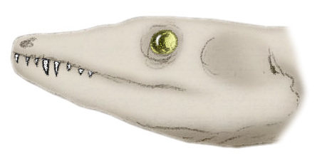 Restoration of Apsisaurus, an extinct synapsid